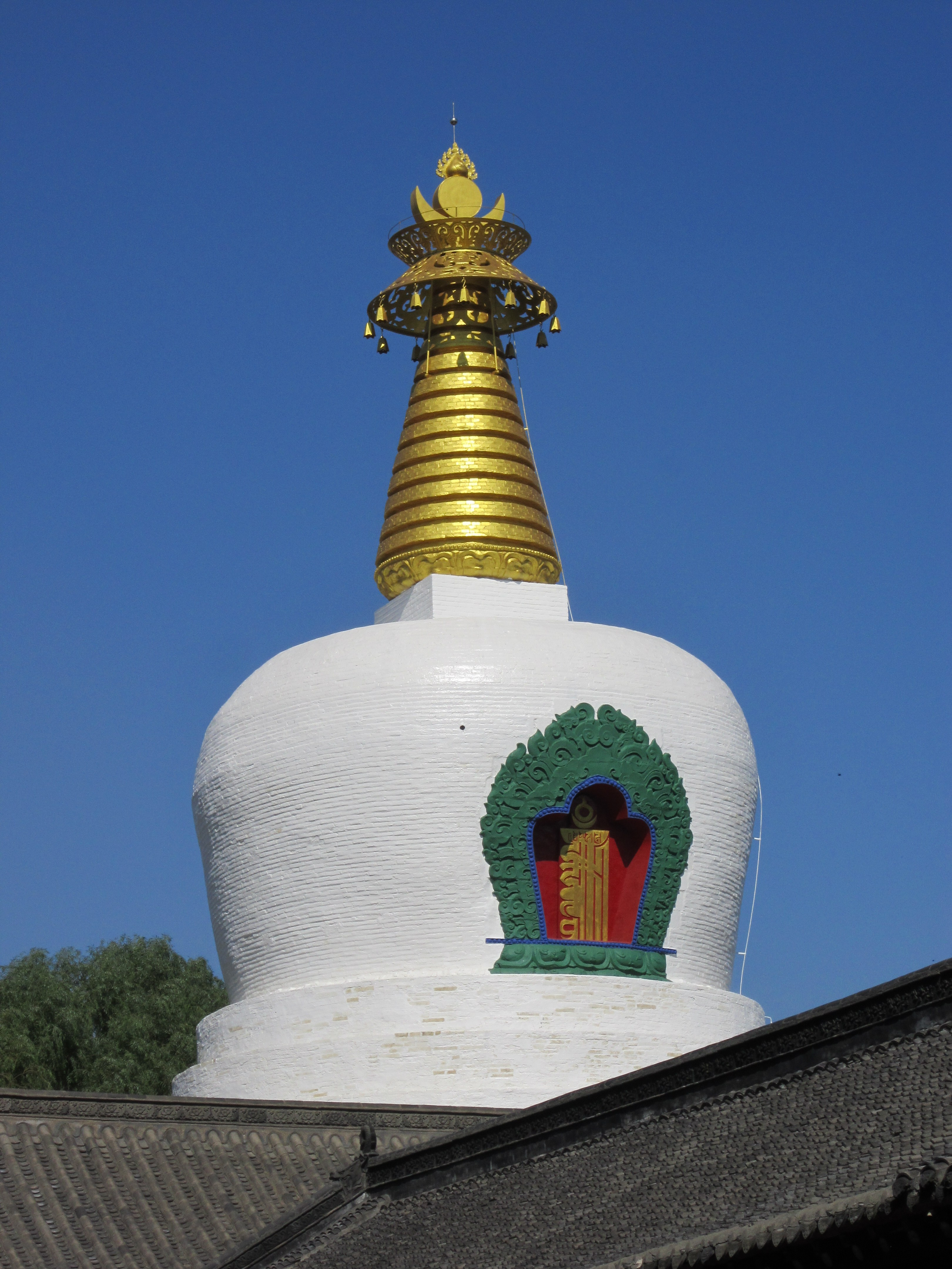 中文（中国大陆）: 清初沈阳城四塔四寺之南塔护国广慈寺